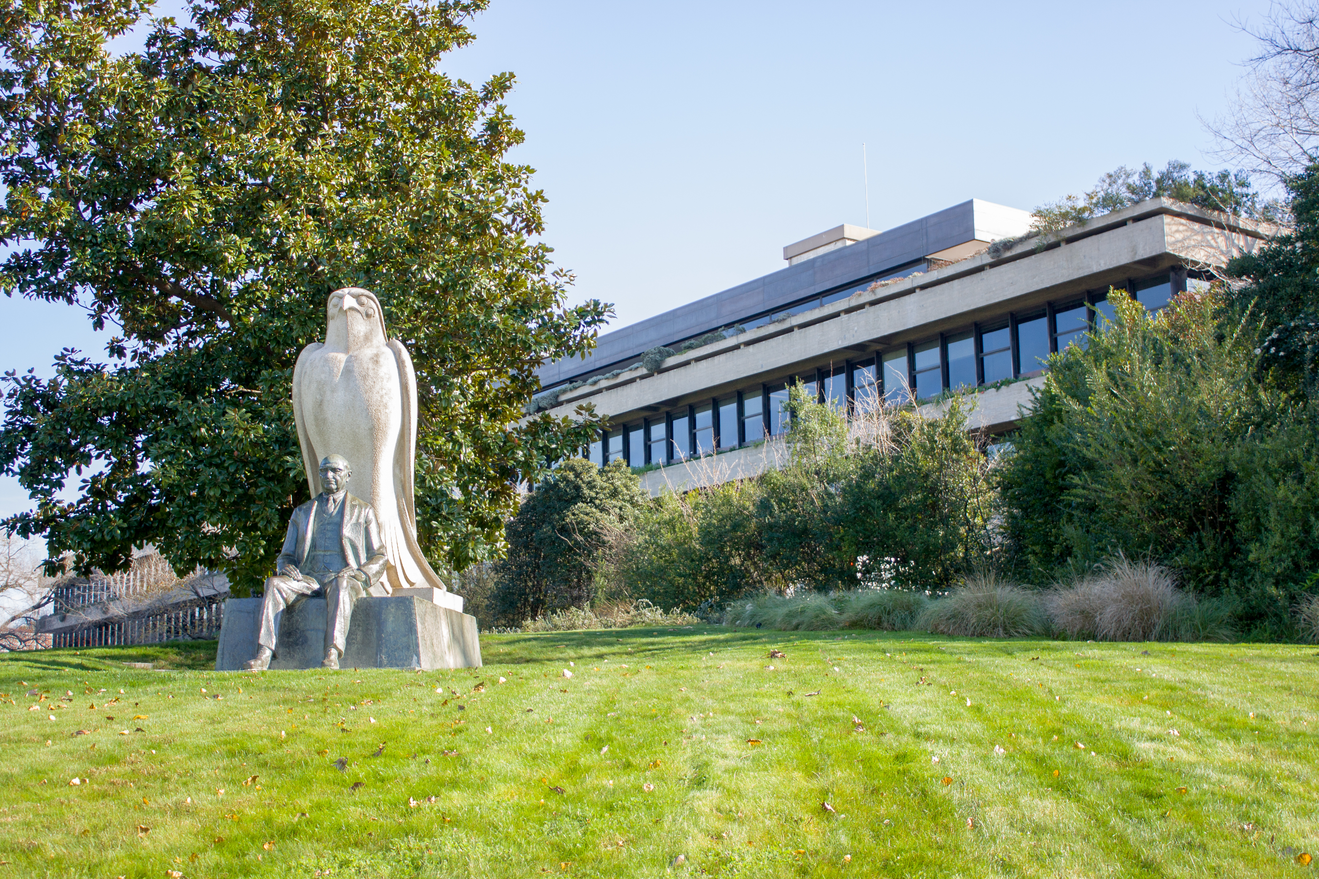 Museu Calouste Gulbenkian